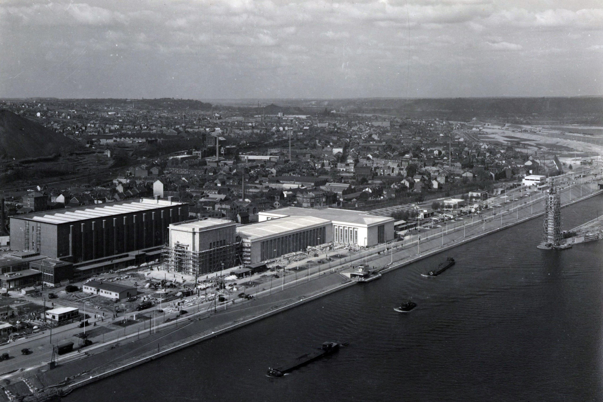 vue du ciel de la rive gauche de l'expo 39